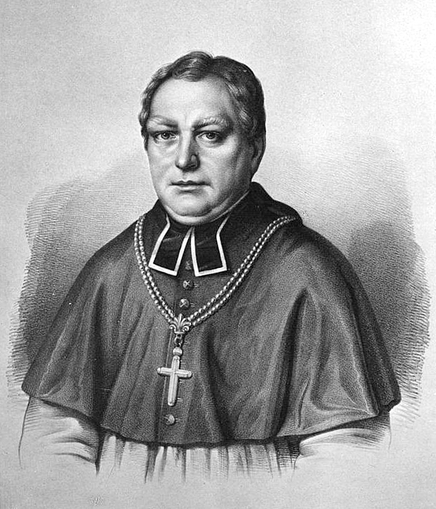 Bildnis des Bischofs Franz Drepper aus Paderborn.